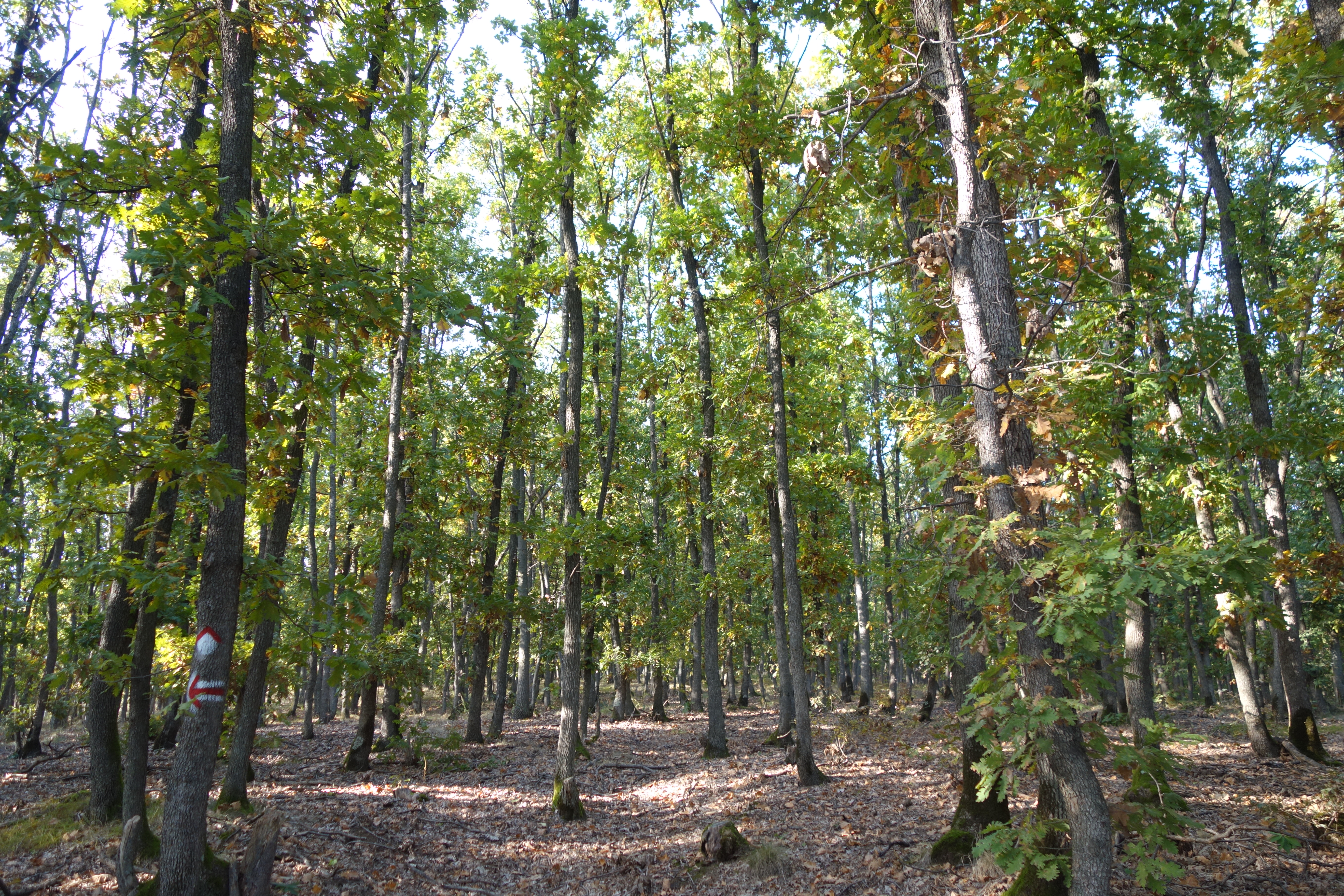 Српски (ћирилица): Ово је фотографија заштићеног природног добра у Србији под шифром: ПИО03 This is a a photo of a natural area in Serbia with ID: ПИО03